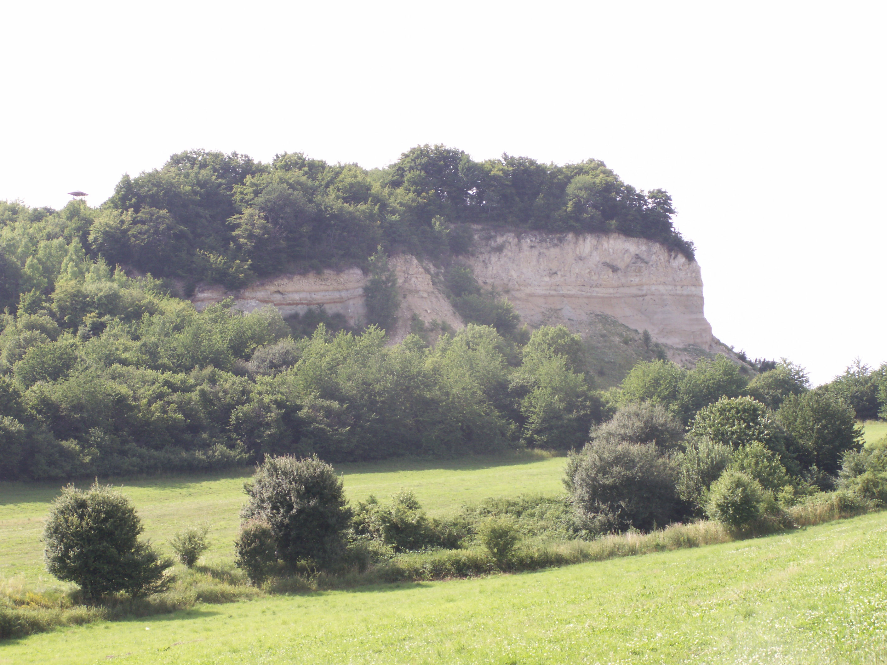 Lom ve svrchnokřídových sedimentech na Malém Chlumu